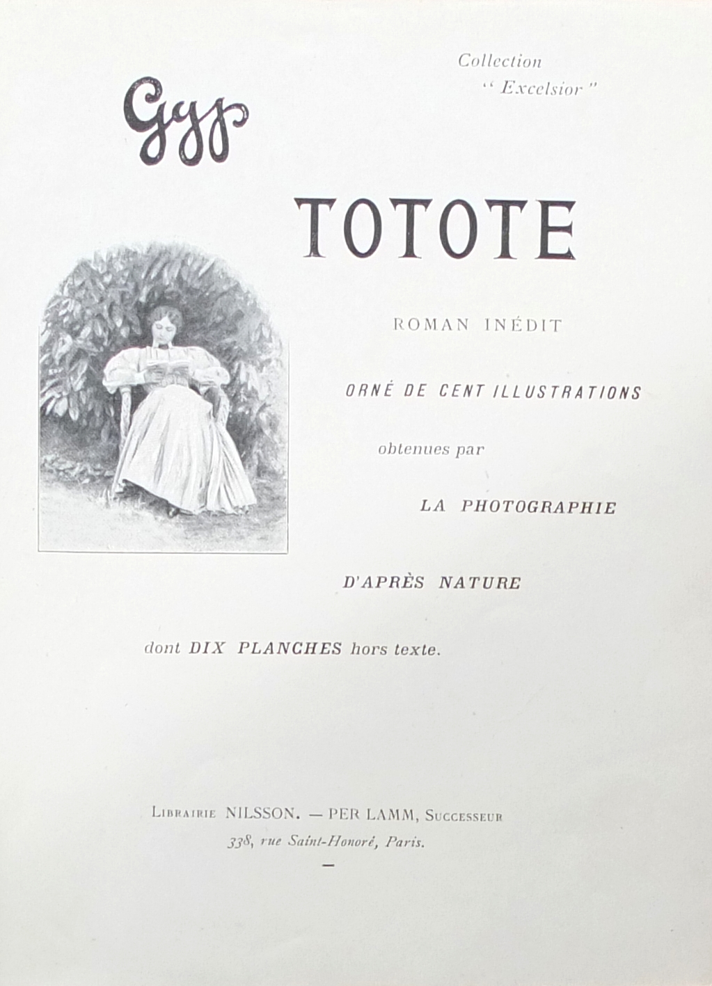 Page de titre de Totote, roman illustré texte de Gyp (Sibylle Gabrielle Riquetti de Mirabeau), illustré de 100 photos de Paul Sescau. 1897, éditions Excelsior, Paris